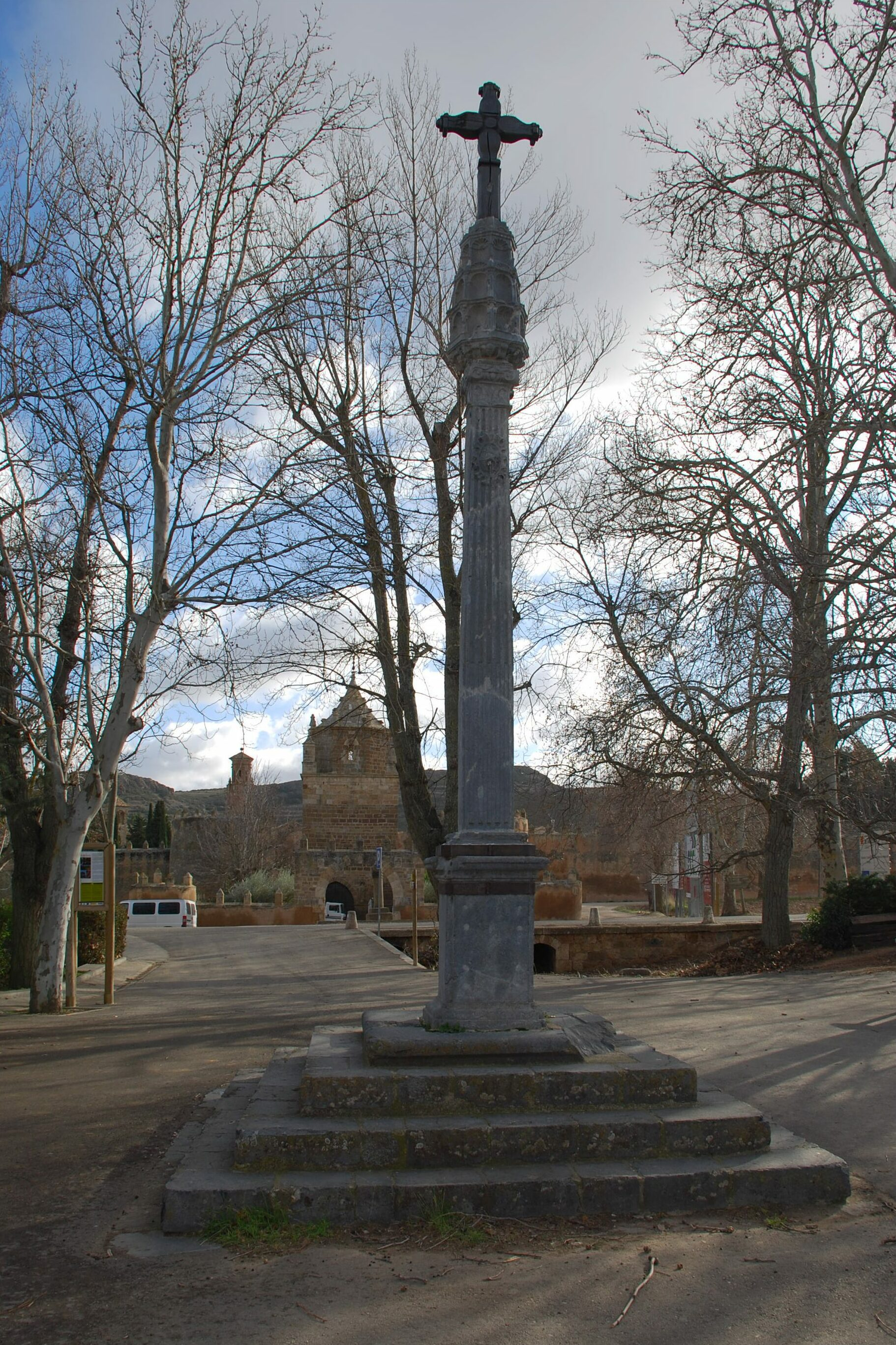 Crucero ubicado frente al monasterio de Veruela en Vera de Moncayo, provincia de Zaragoza (España).